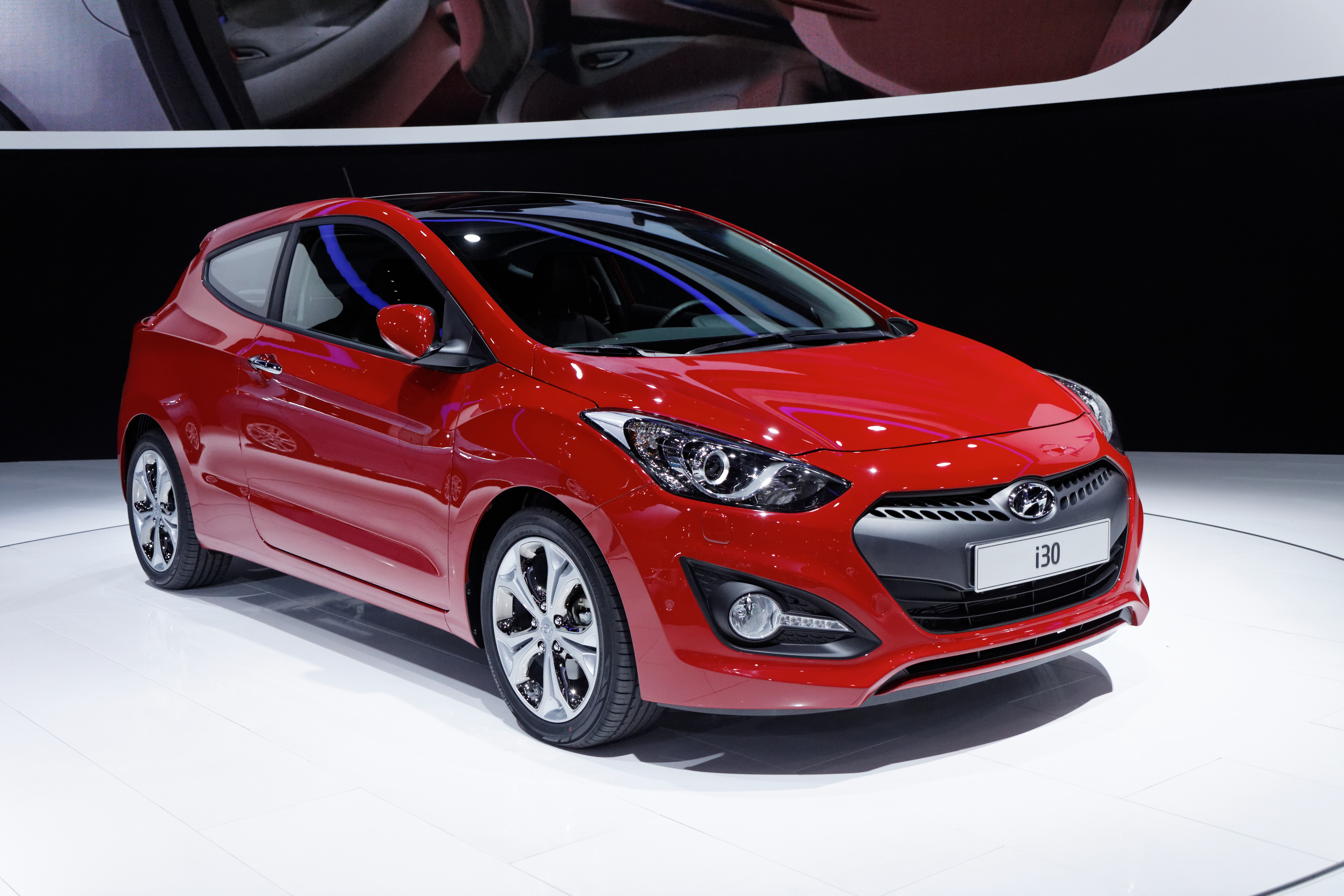 une Hyundai i30 présentée lors du mondial de l'automobile de Paris 2012.